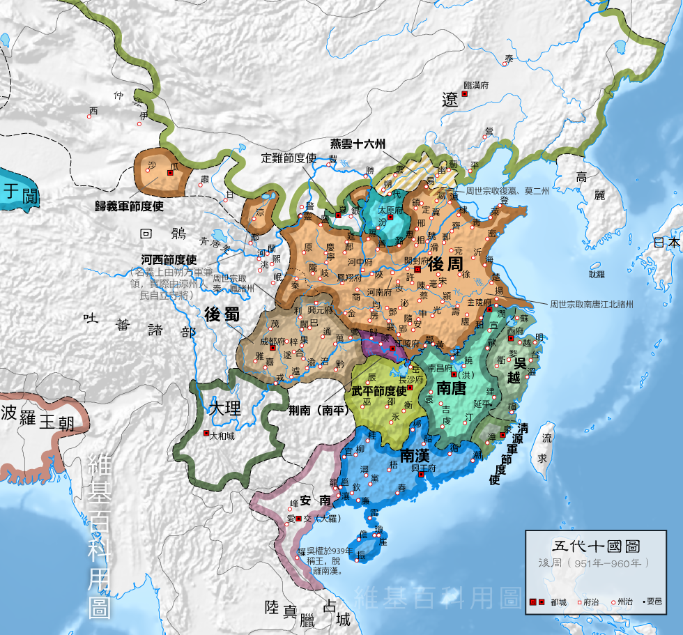 五代